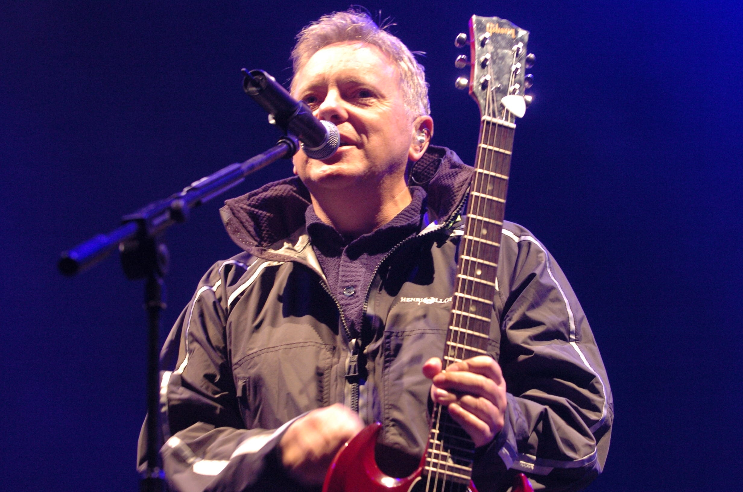 New Order på Arvikafestivalen